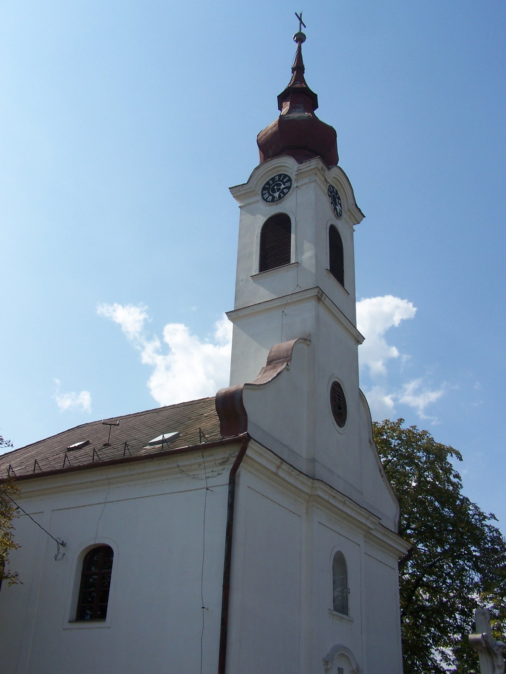 Római katolikus templom (Nepomuki Szent János) (Várdomb, Kossuth Lajos u.)